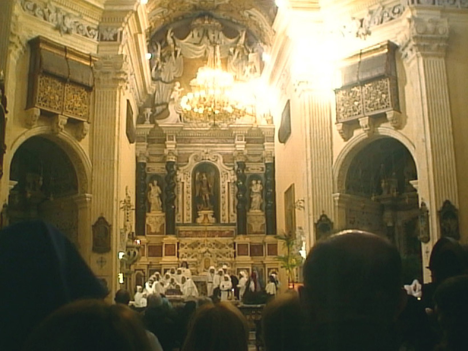 Interno della chiesa di San Michele durante una funzione religiosa della Settimana Santa